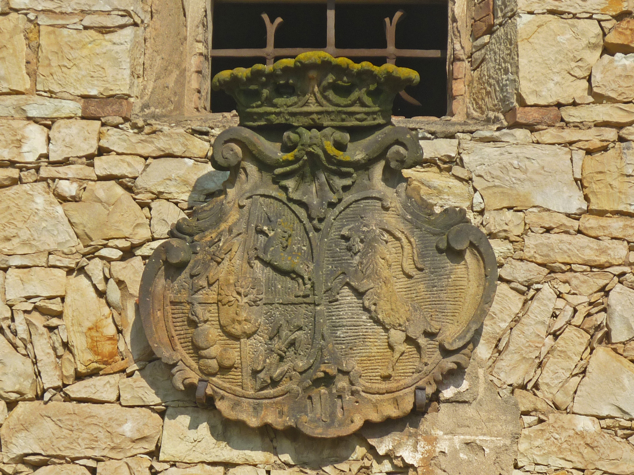 Kulhanek-Hohenems-Doppelwappen am Speicher (Schüttboden) in Stecknitz (Stekník) in Nordböhmen anlässlich der Hochzeit von Johann Franz Graf Kulhanek von Klaudenstein († 1799) mit Maria Franziska Gräfin von Hohenems († 1795).